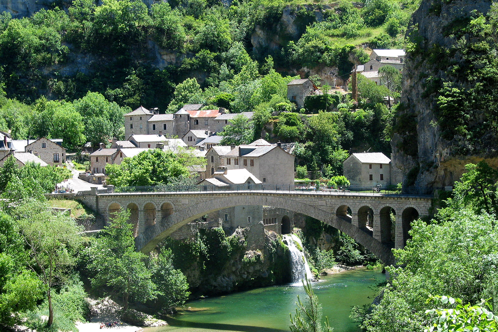 Saint-Chély-du-Tarn Lozère - France, la village dans les gorges du Tarn.